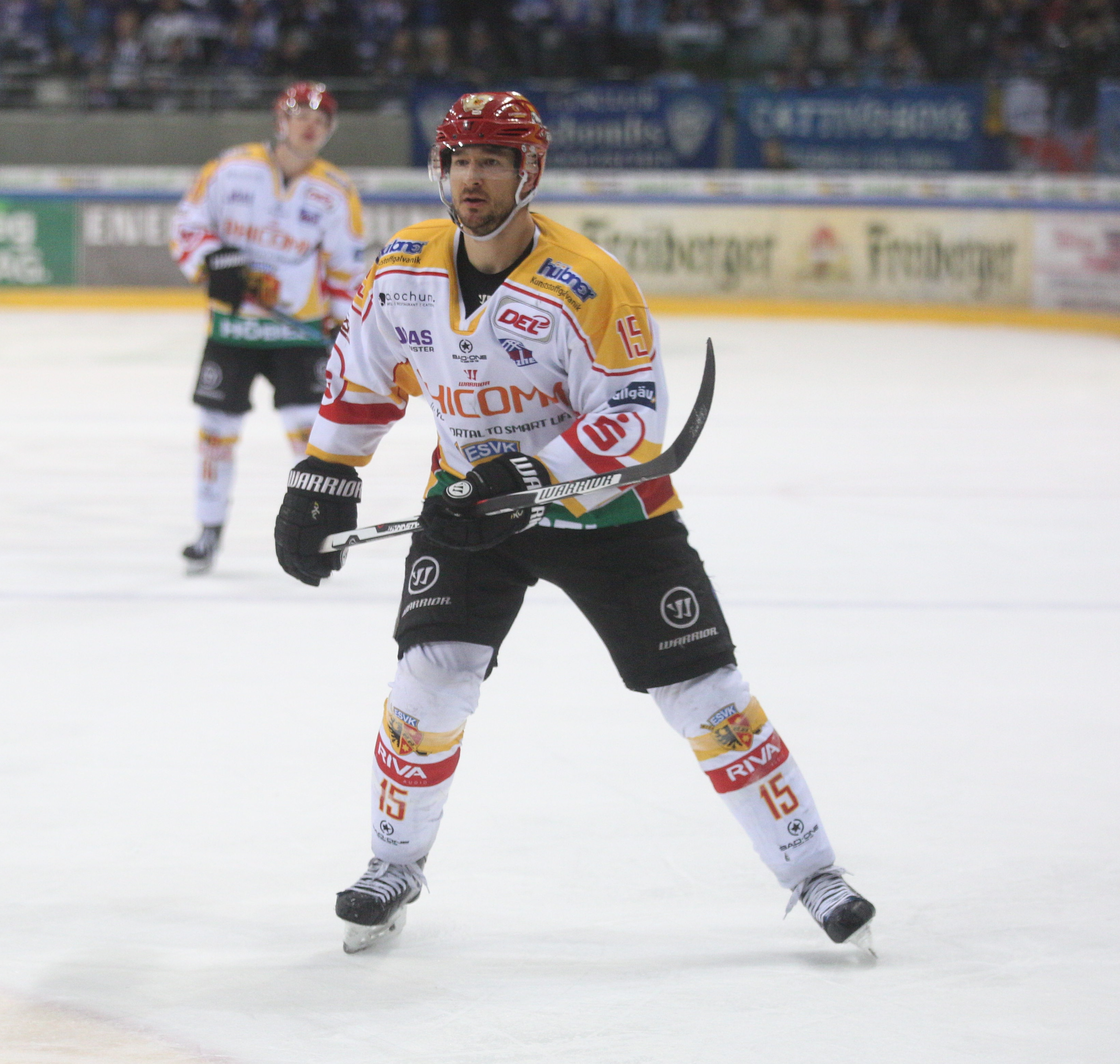 DEL 2 Play-off-Spiel Dresdner Eislöwen gegen ESV Kaufbeuren (1:4) am 14. März 2017 in der EnergieVerbund-Arena, Dresden